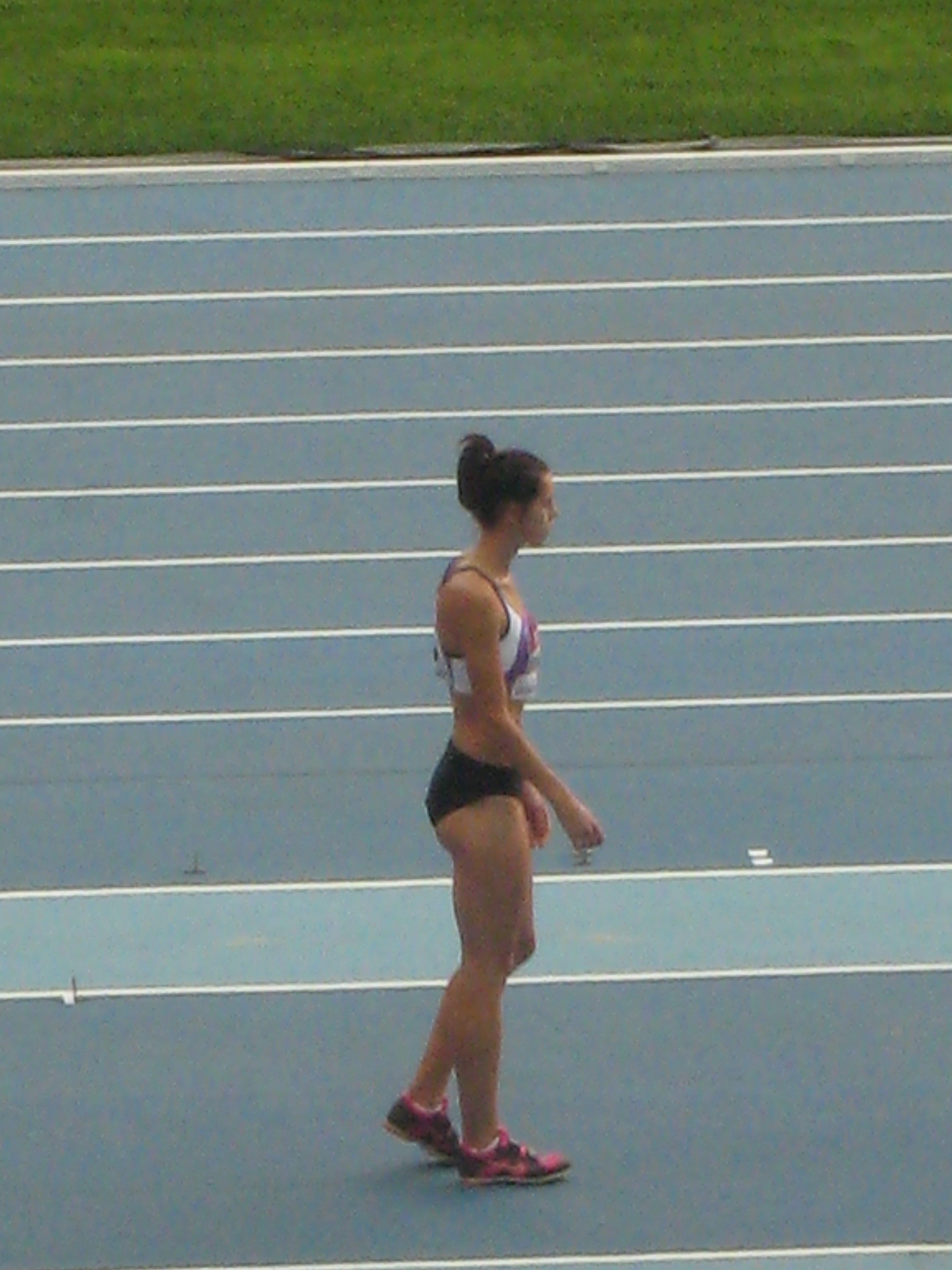 Чемпионат мира по лёгкой атлетике 2013. Израильская спортсменка Ханна Князева-Миненко